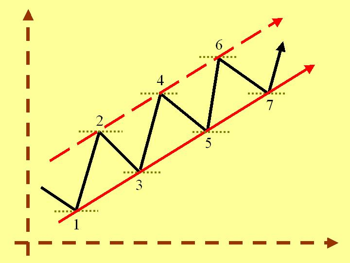 Esquema de canal a la baja